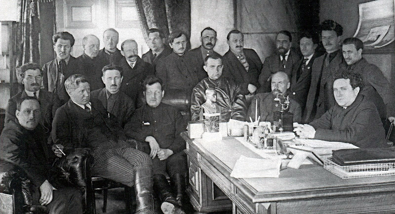 Группа членов Большого президиума Ленинградского совета рабочих, крестьянских и красноармейских депутатов на заседании. За столом первый справа сидит Г.Е Зиновьев. Ленинград, первая половина 1920-х годов